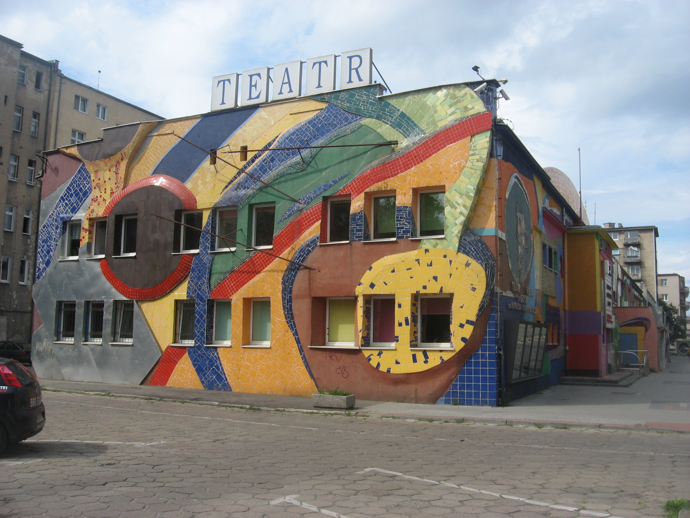 Teatr Miejski w Gdyni im. Witolda Gombrowicza